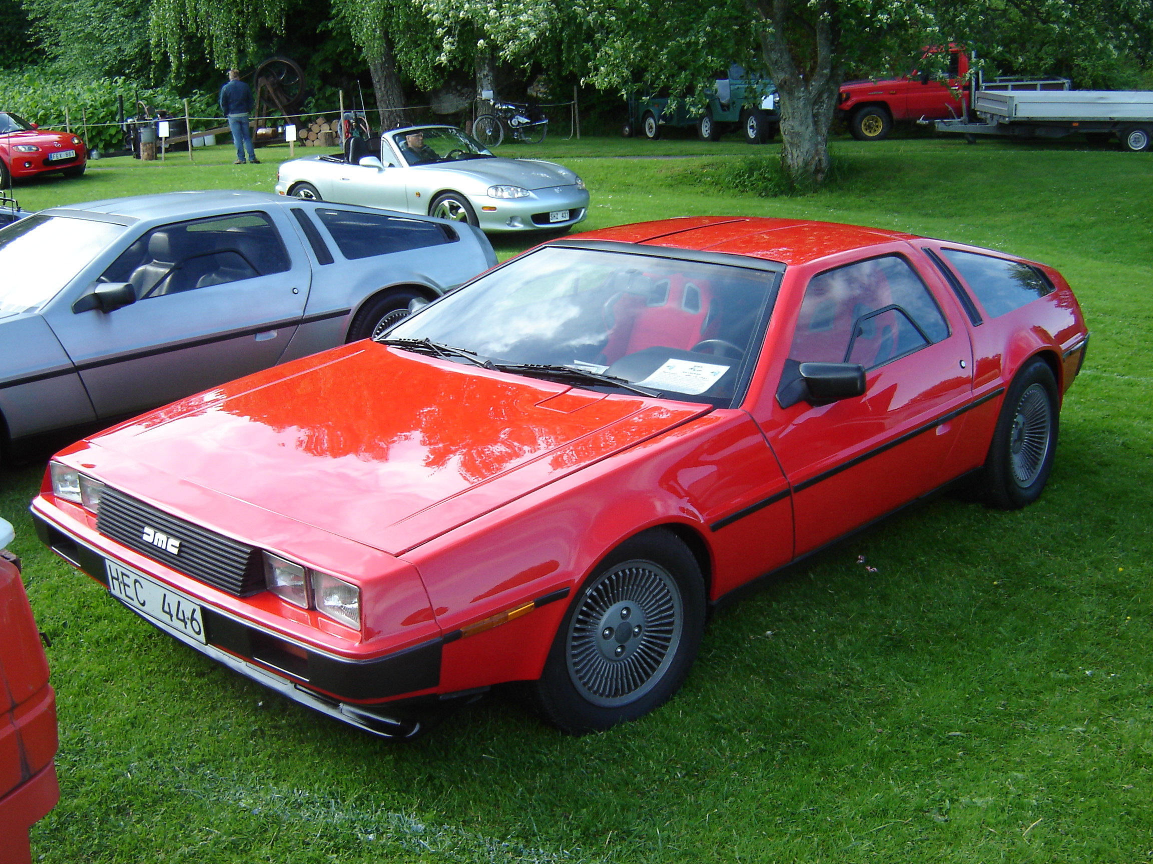 De Lorean DMC